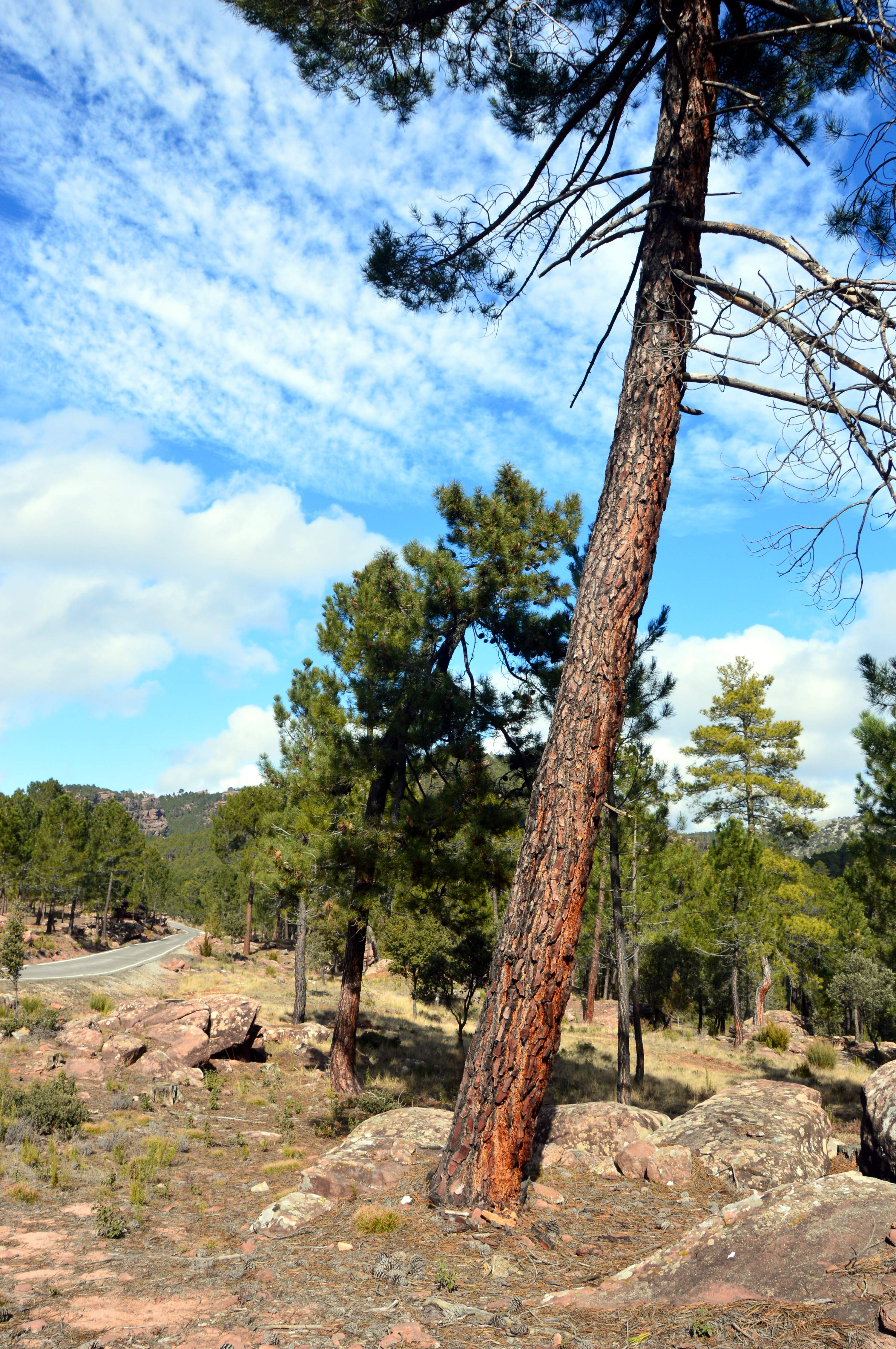 Paisaje del Rodeno, con detalle de pino rodeno, Parque Cultural de Albarracín (2018).